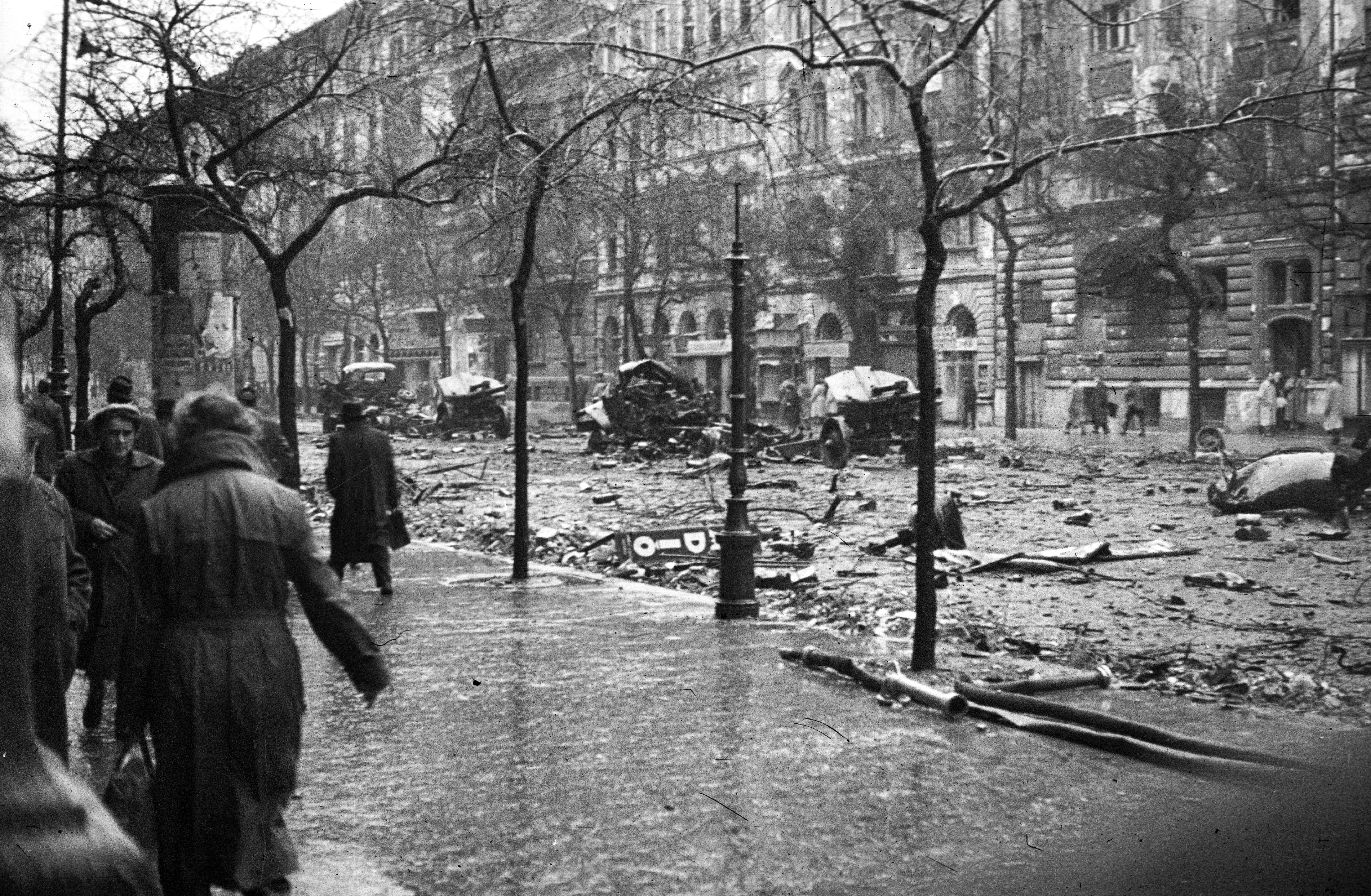 Ferenc körút a Tompa utca felől az Üllői út irányába nézve. Location: Hungary, Budapest IX. Tags: wreck, ordnance, weapon, ad pillar, poster, Budapest, revolution Title: Ferenc körút a Tompa utca felől az Üllői út irányába nézve.